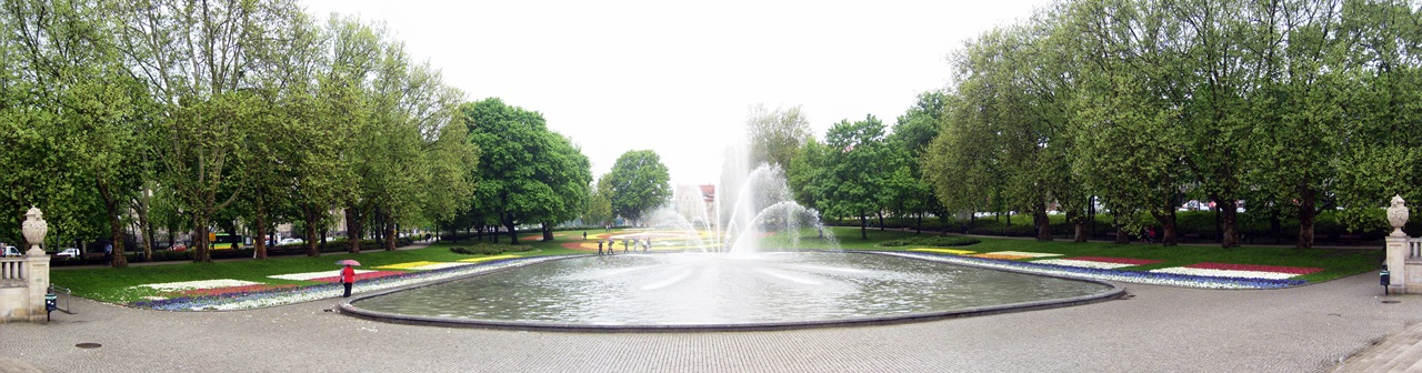 Poznań, Park Mickiewicza, widok w stronę Akad. Muz.